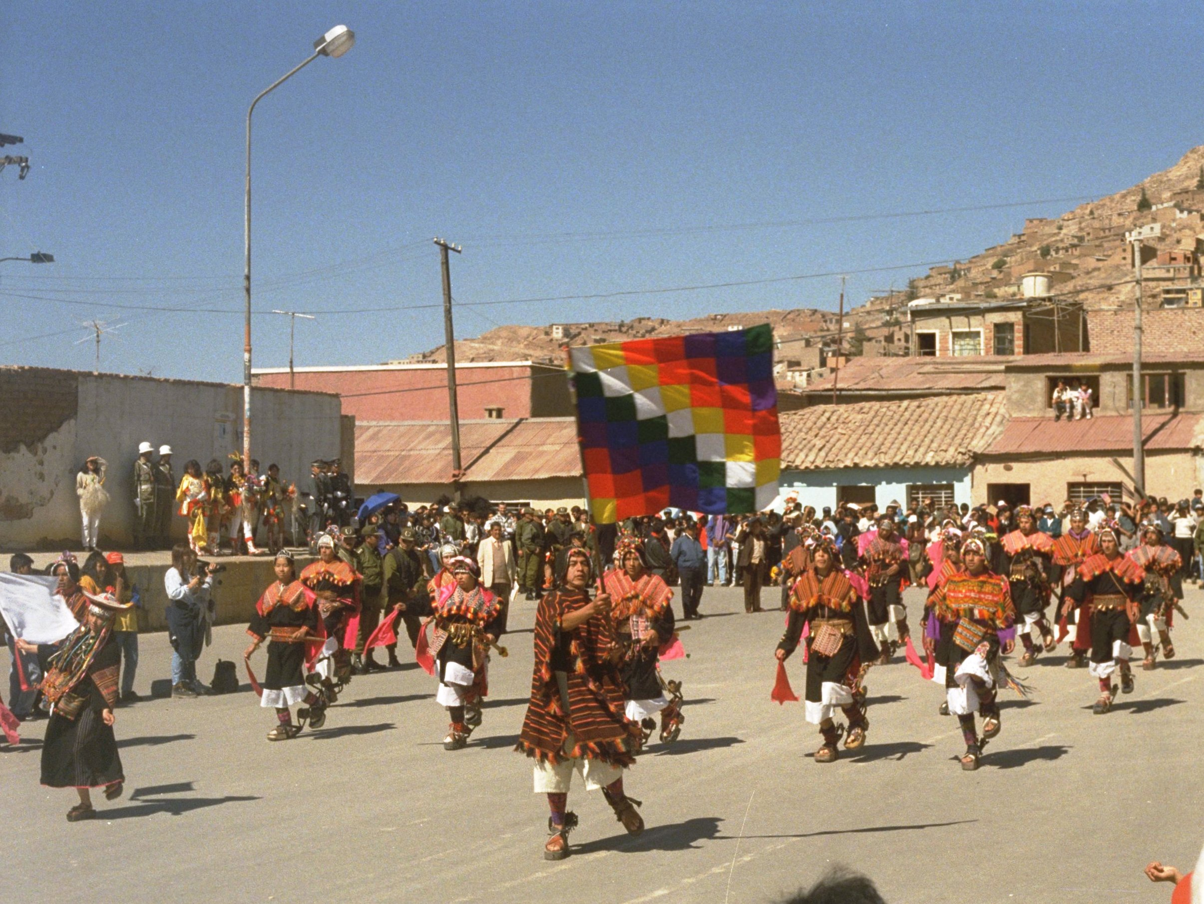 Desfile con Wiphala. Oruro, Bolivia.